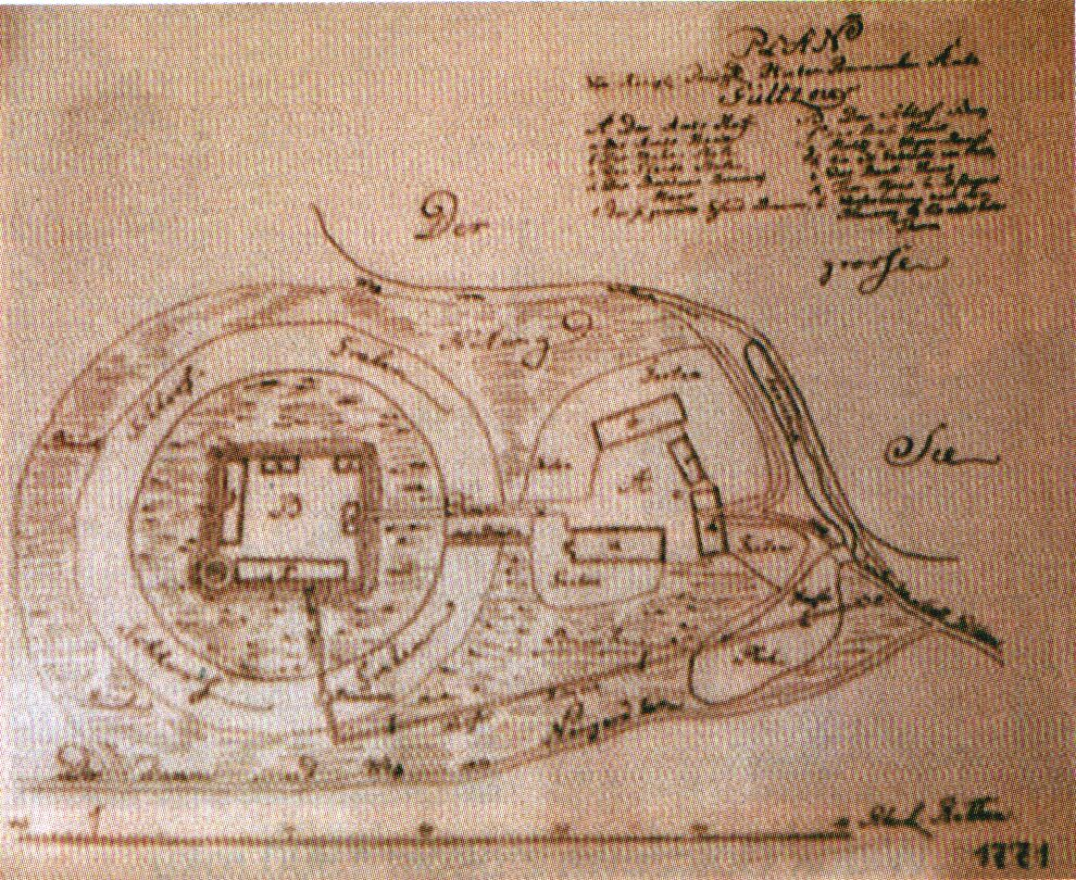 Plan zamku biskupów kamieńskich w Golczewie z 1771 roku.